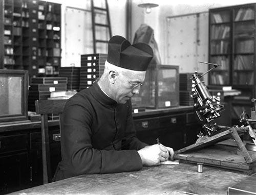 中文（中国大陆）: 在北疆博物院工作中的桑志华